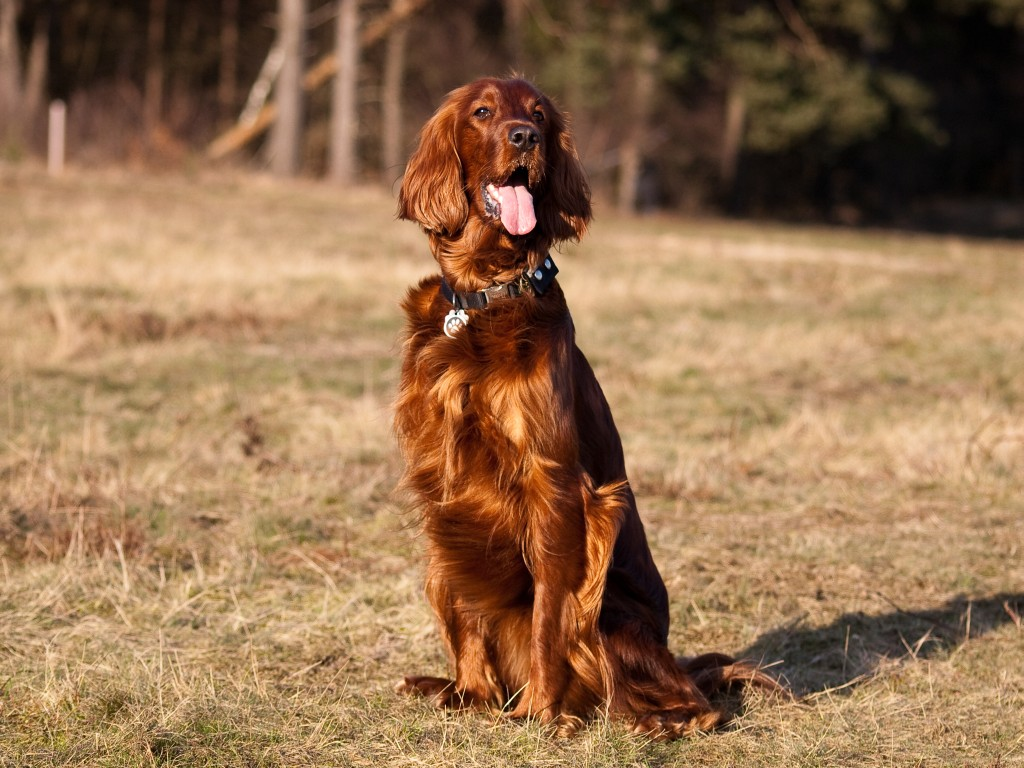 Irish Red Setter Hündin im Sitz